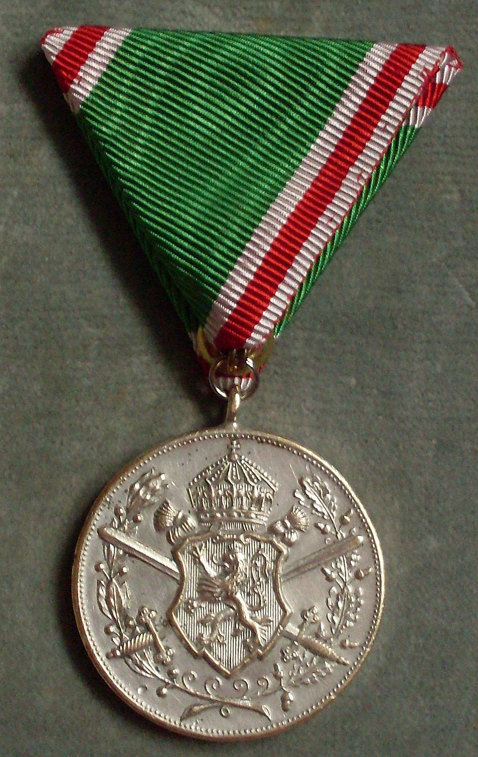 Bulgarische Kriegserinnerungsmedaile 1912/1913 Avers